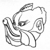 Карура (маска персонажа гигаку)